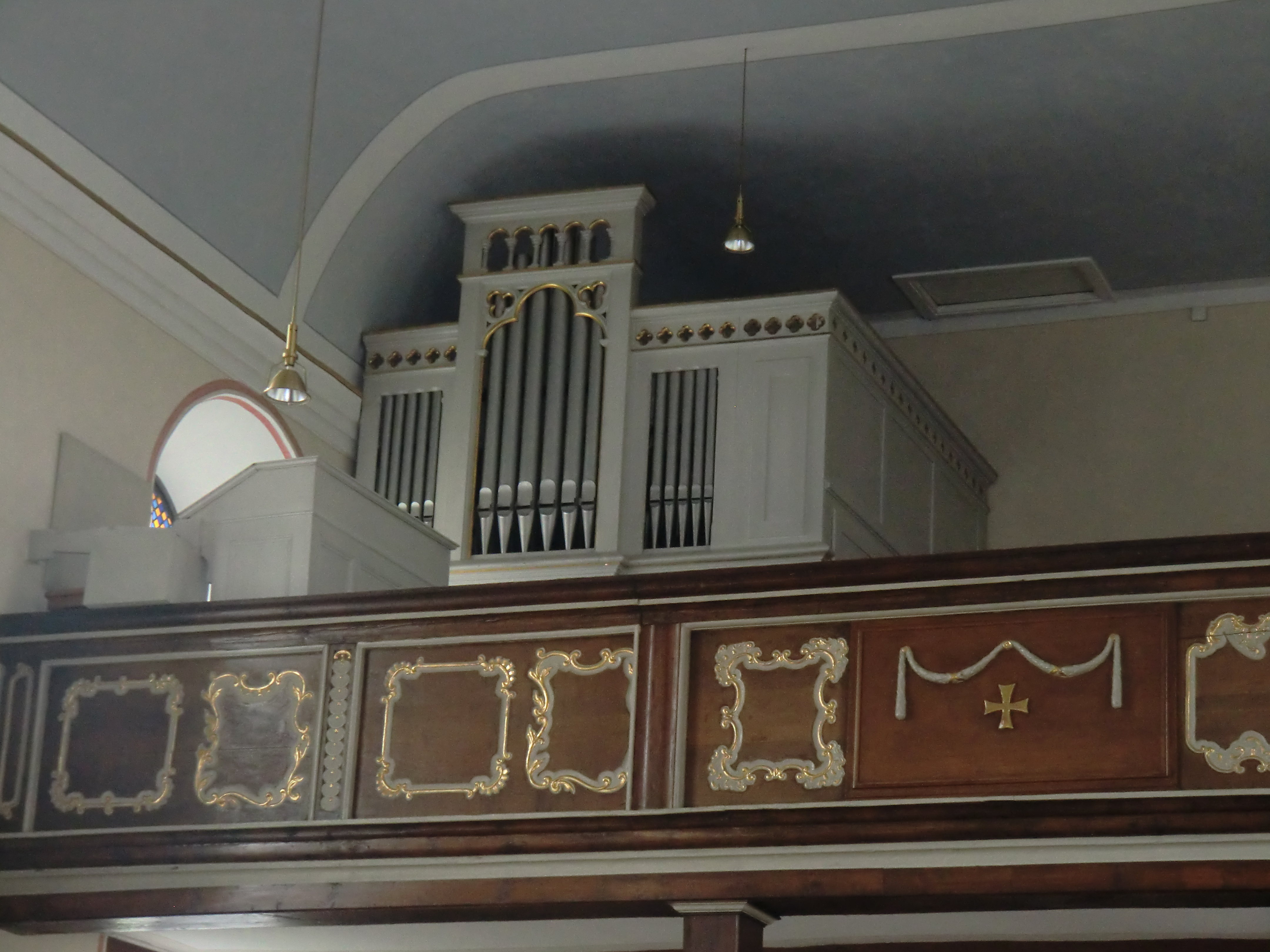 Orgelprospekt in Girod (Carl Horn, 1905)